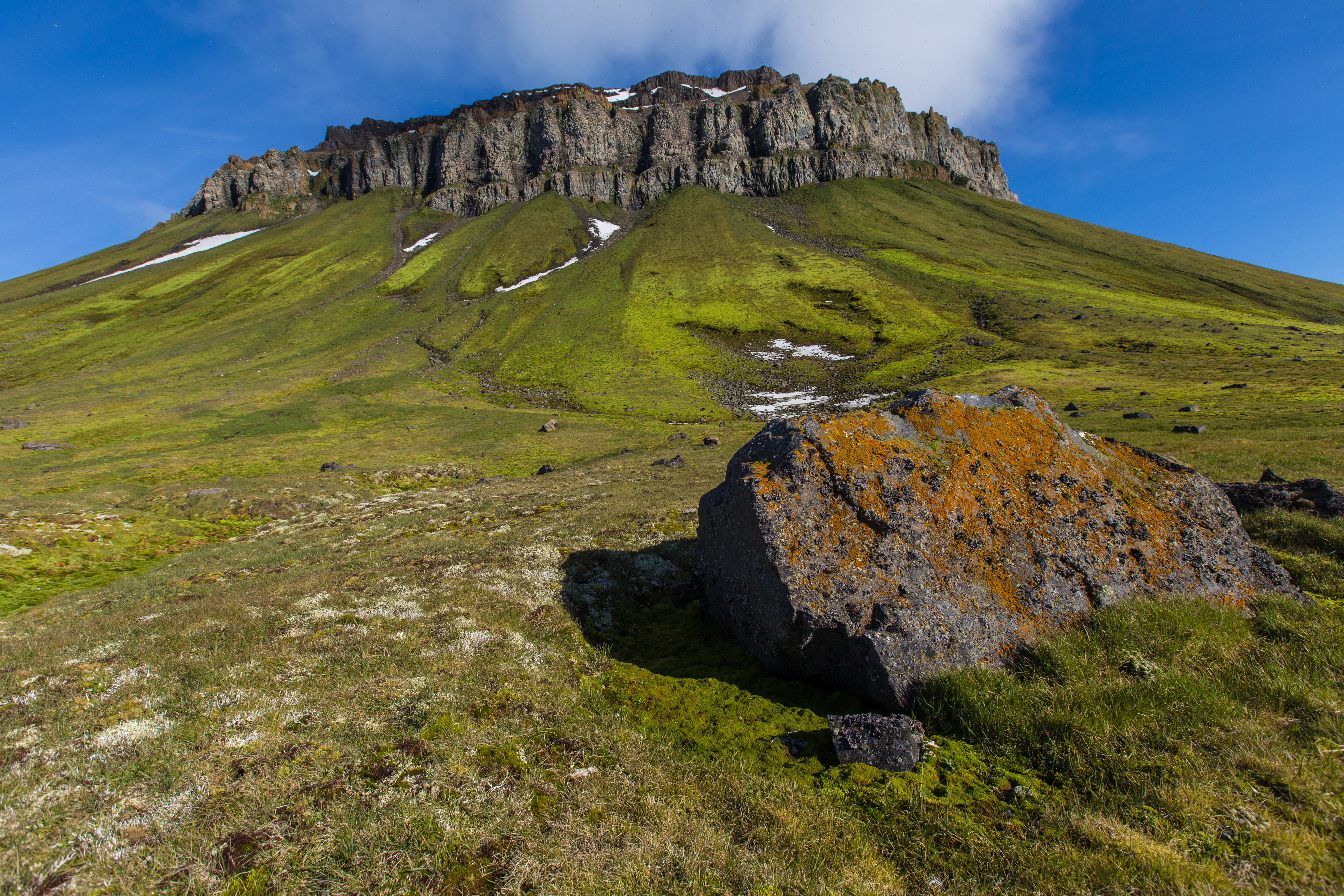 Комплексный заказник Земля Франца-Иосифа, Приморский район This image is related to the protected area of Russia number 2930163